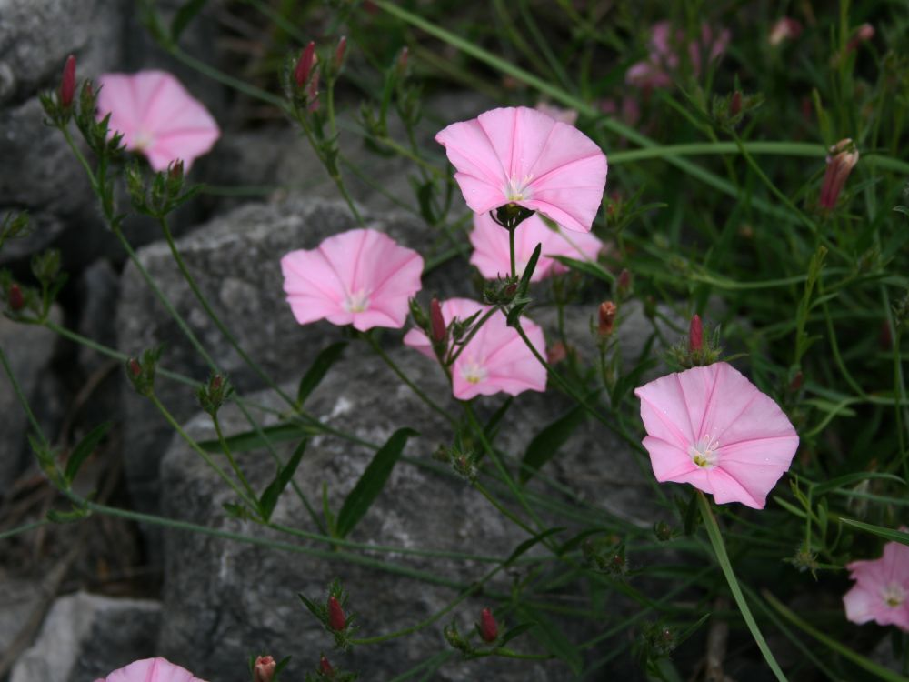 Convolvulus cantabrica, Windengewächse (Convolvulaceae) - Italien/Italia/Italy: Friuli-Venezia Giulia, Prov. Trieste, Rilkeweg/Sentiero Rilke von Sistiana nach Duino